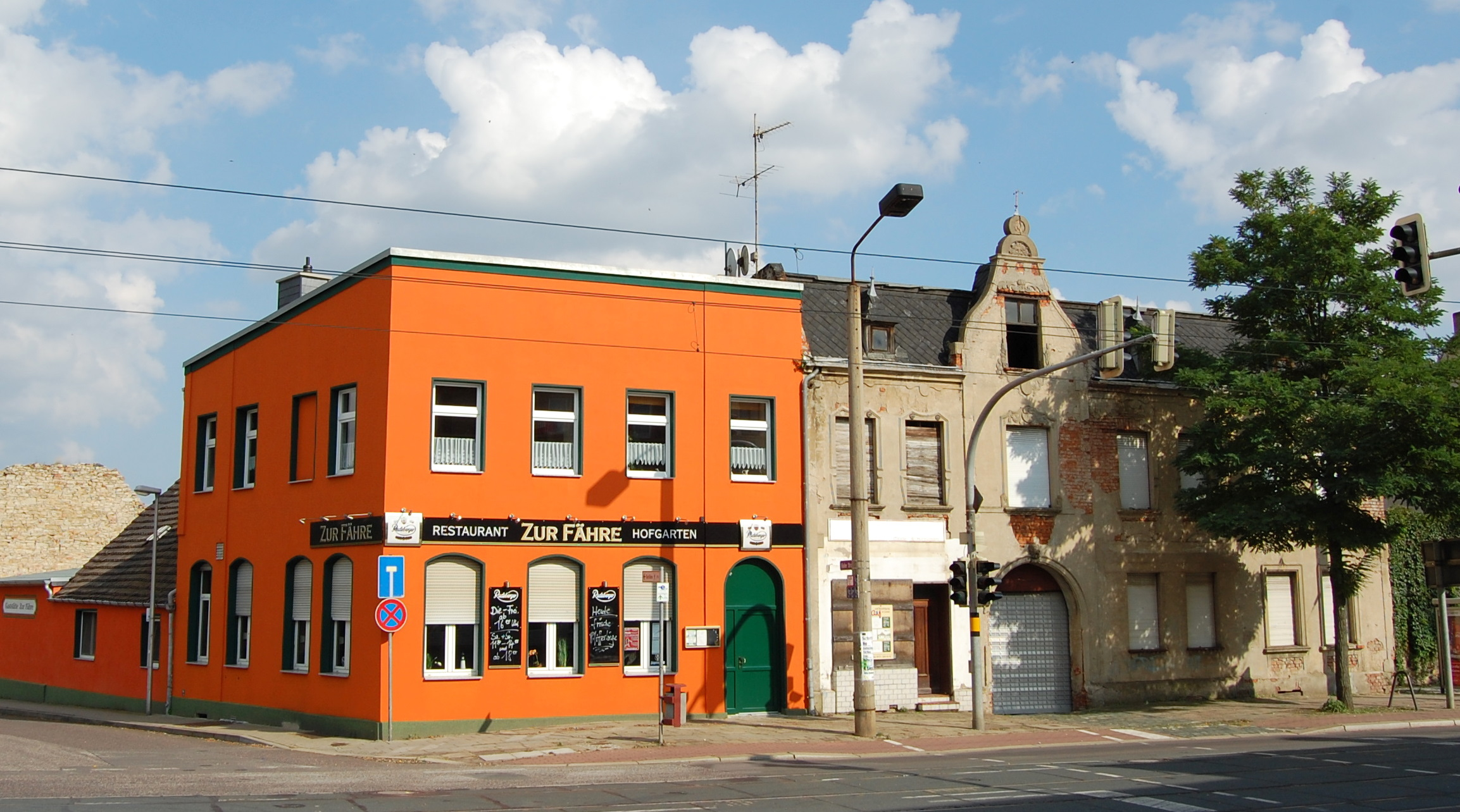 Gaststätte Zur Fähre in Magdeburg-Westerhüsen